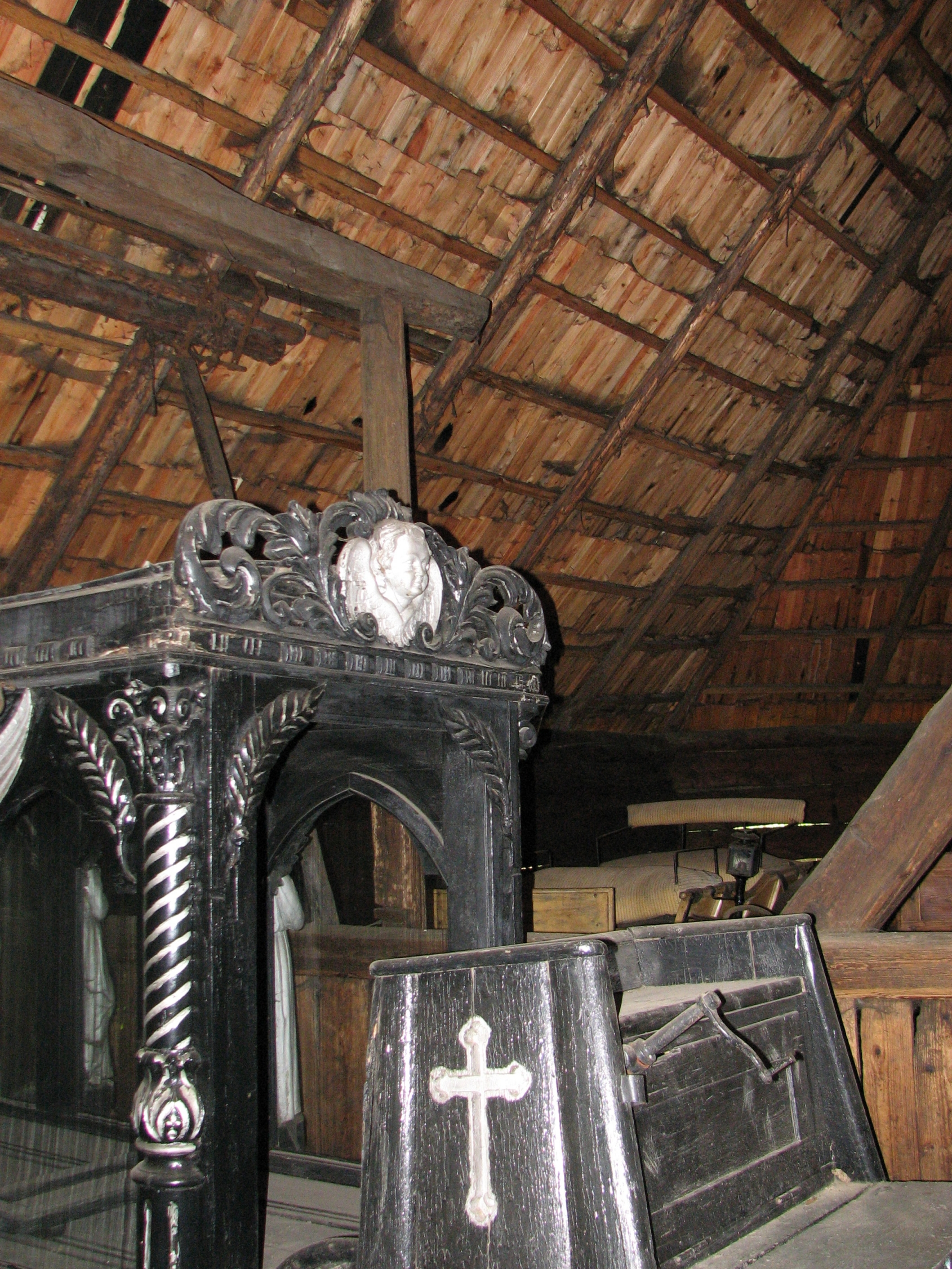 Pszczyna - karawan w Zagrodzie Wsi Pszczyńskiej (zabytek nr A/1219/76)